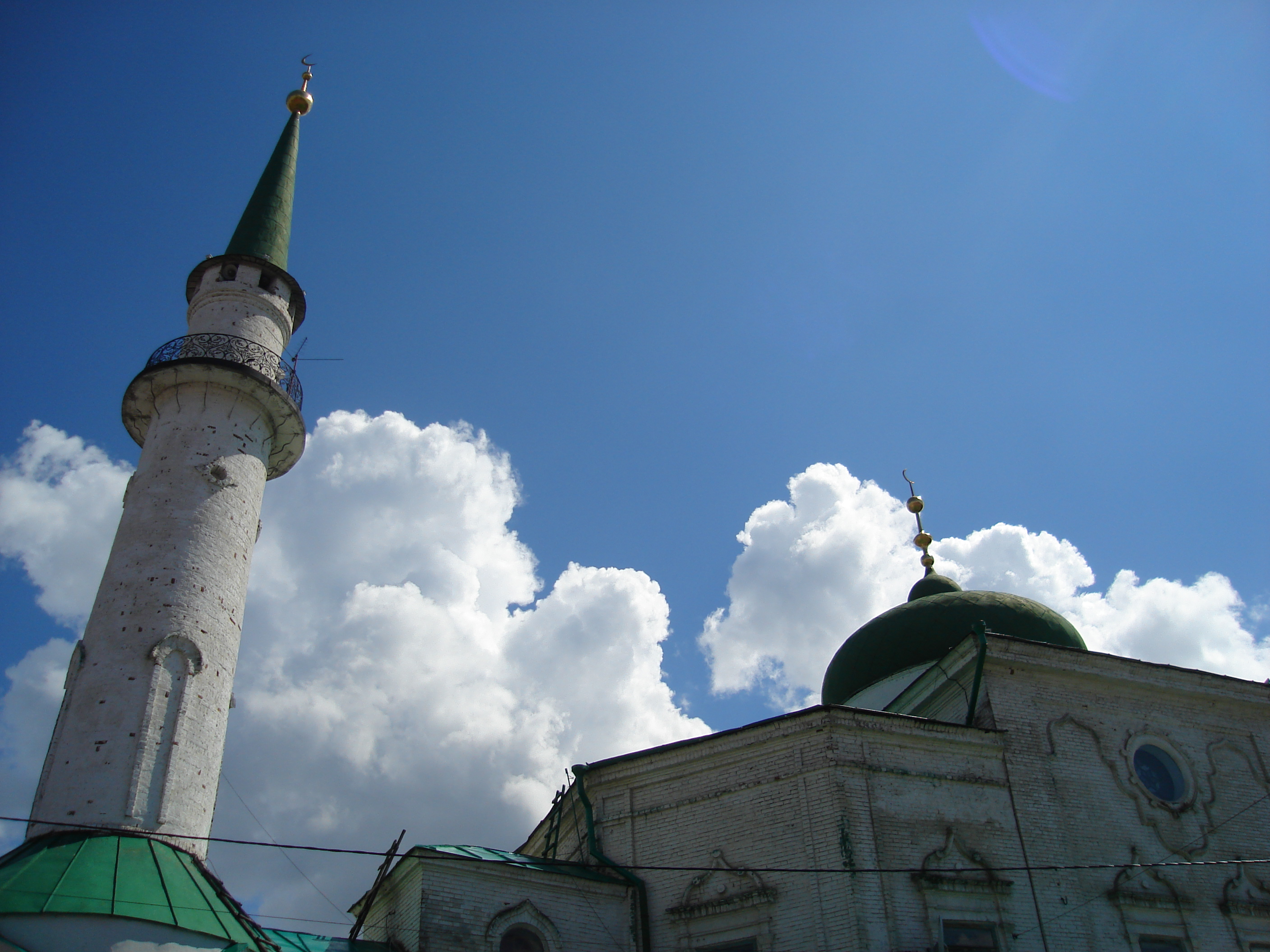 Nurulla Mosque